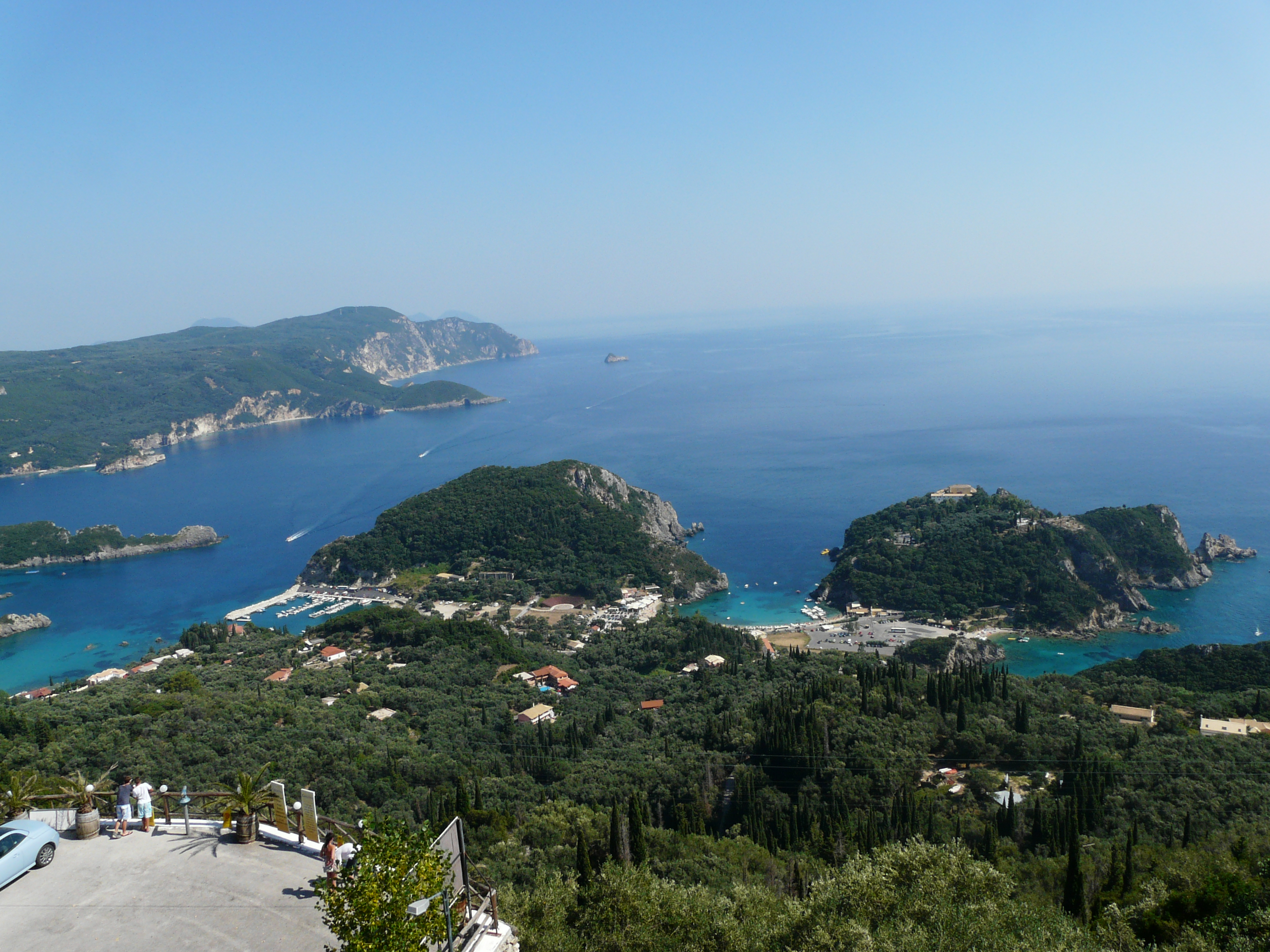 Palaiokastritsa, Corfu